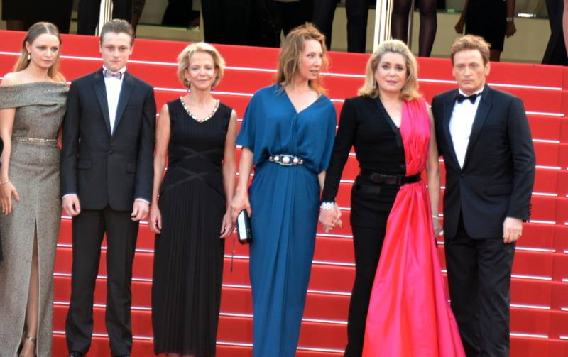 Sara Forestier, Rod Paradot, Frédérique Bredin (présidente du CNC), Emmanuelle Bercot, Catherine Deneuve et Benoît Magimel lors de la présentation du film "La Tête haute" au festival de Cannes